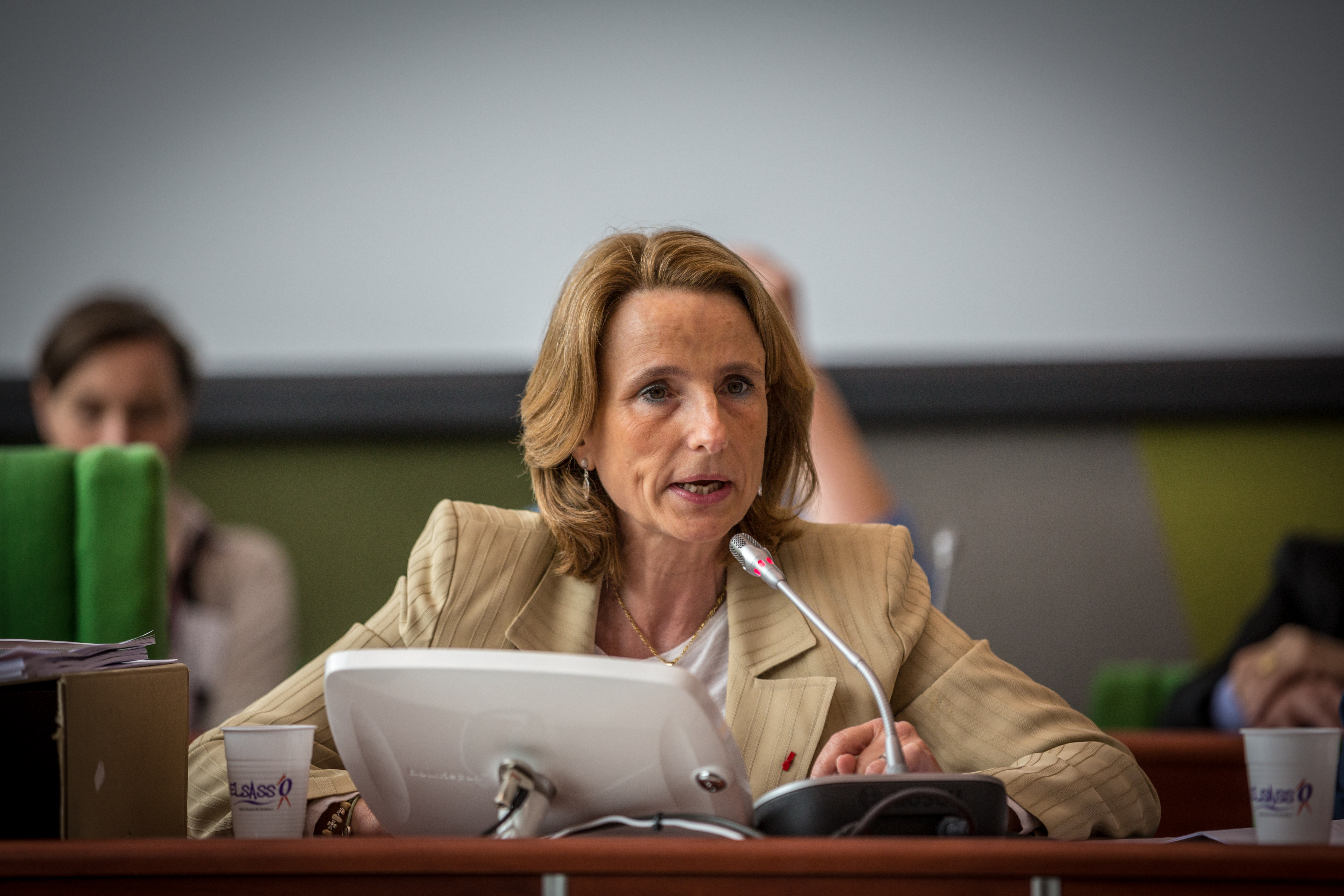 Béatrice Bourges, Manif pour tous et veillleurs à Strasbourg au Conseil de l’Europe le 26 juin 2013.